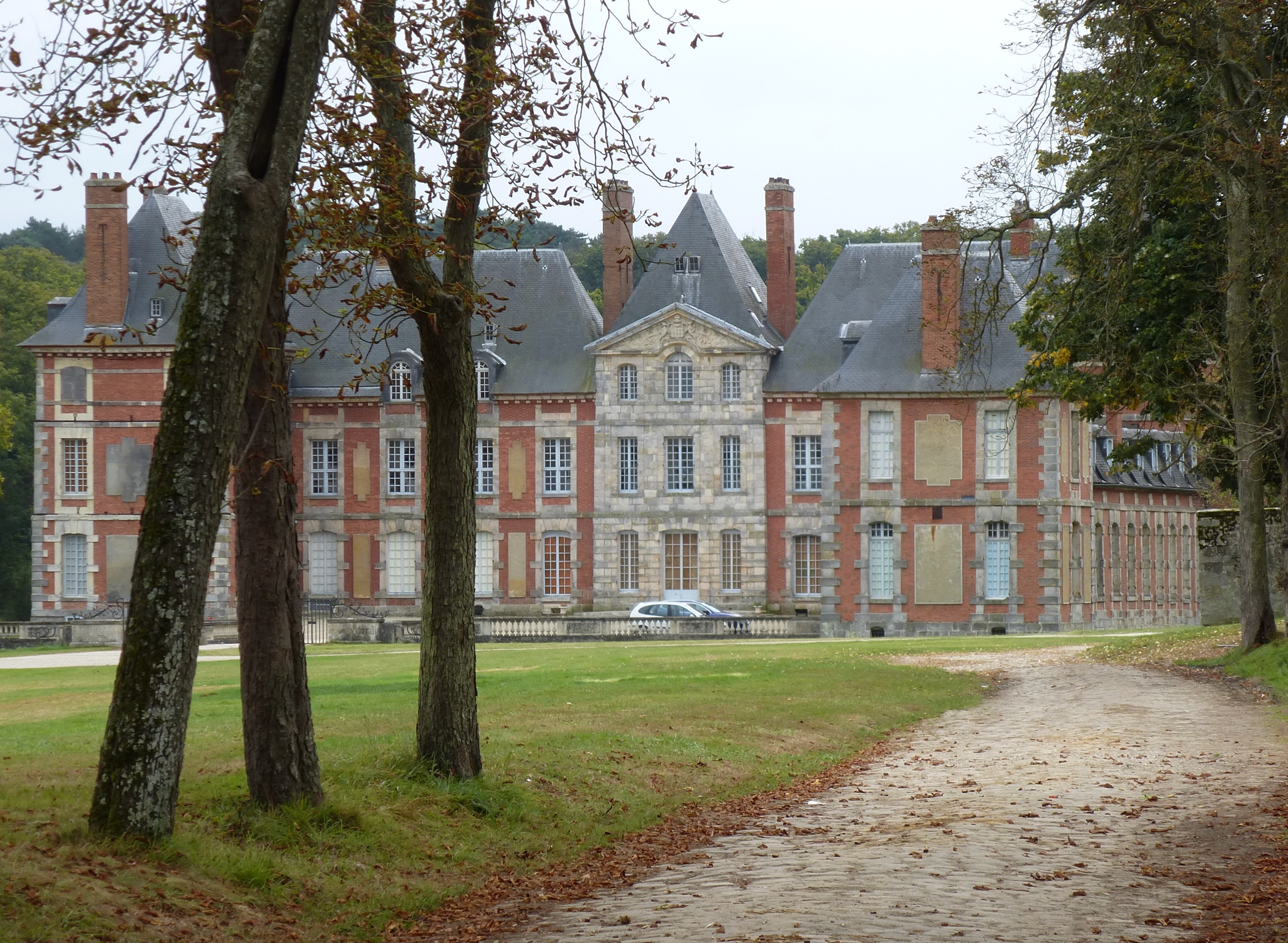 Façade nord du château de Baville. (Essonne, région Île-de-France).